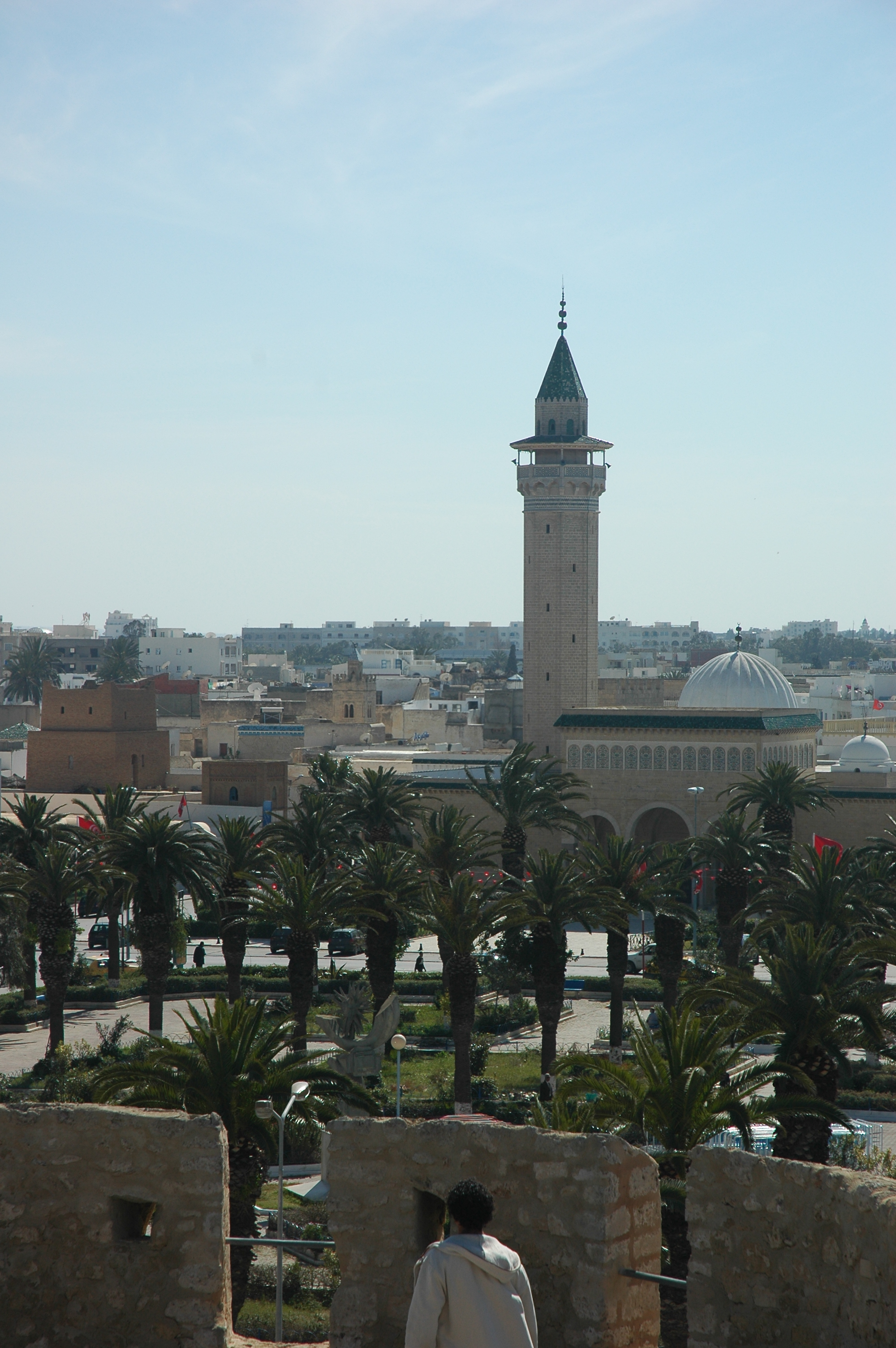 Mosquée Habib Bourguiba à Monastir en Tunisie